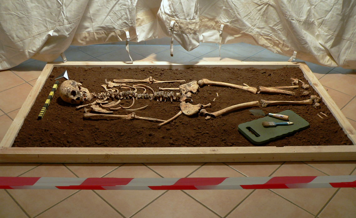 Bestattung auf dem Gräberfeld von Gevensleben in der Ausstellung „1018? Menschen erleben Geschichte“